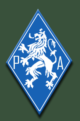 Écusson de l'Armée belge des partisans, mouvement belge de résistance durant la seconde guerre mondiale